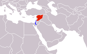 Locator